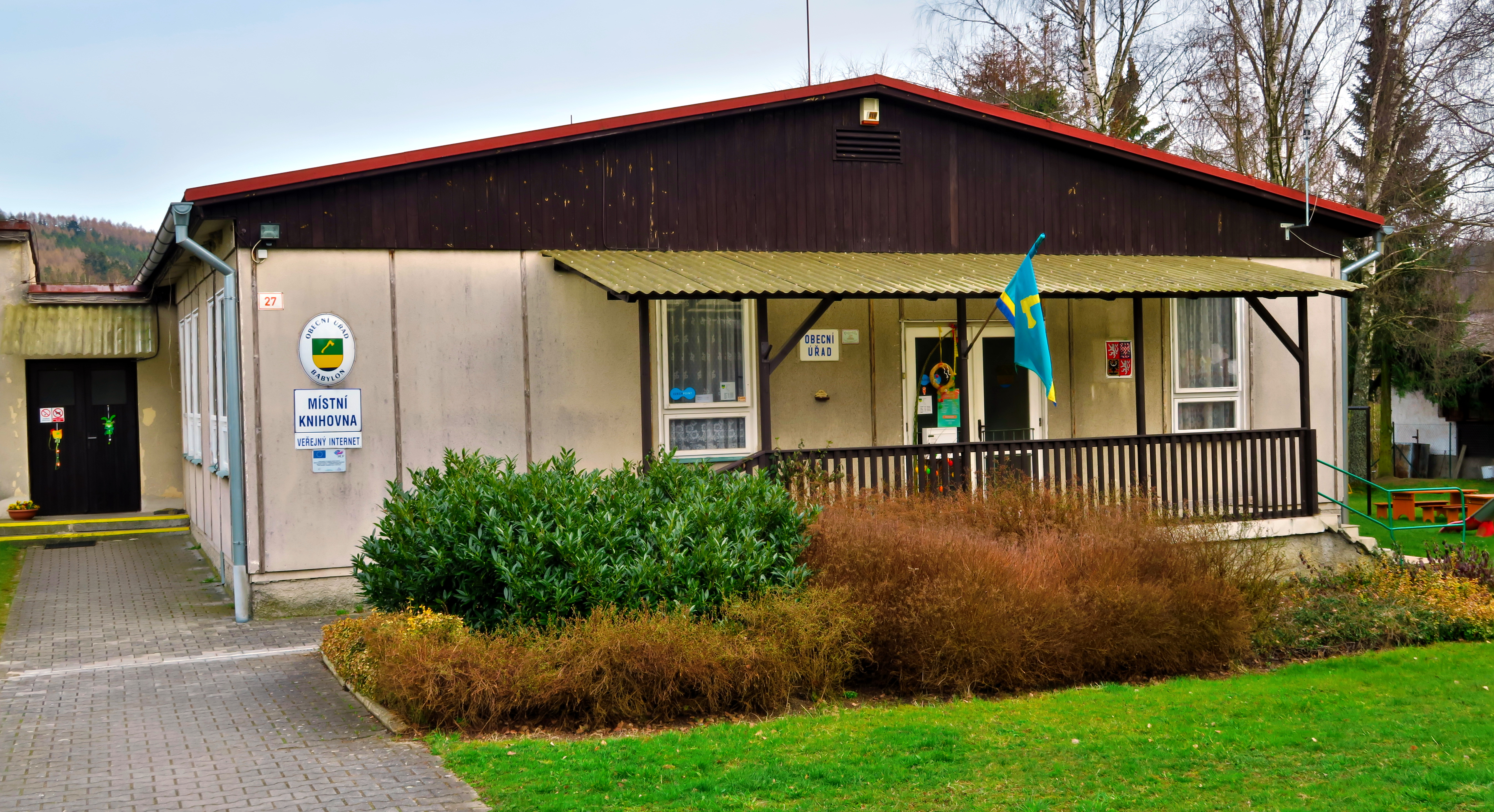 Tschechische Republik, Ortschaft Babylon, Gemeindeamt "Rathaus" und Bibliothek